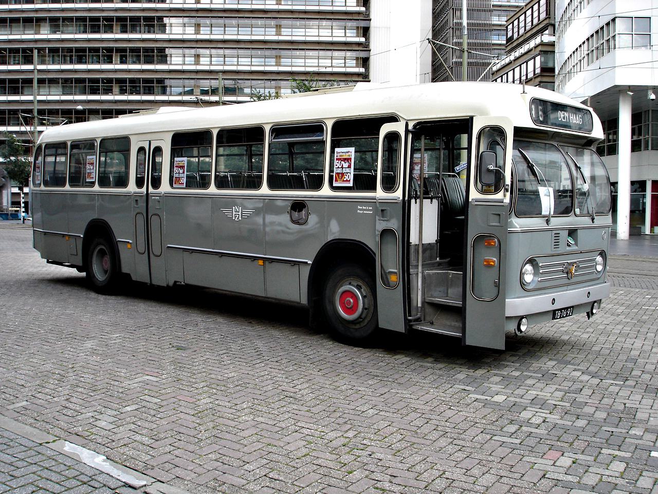 HBM 4842, een Leyland/Werkspoor van de NZH uit 1960. Thans bij Haags Bus Museum